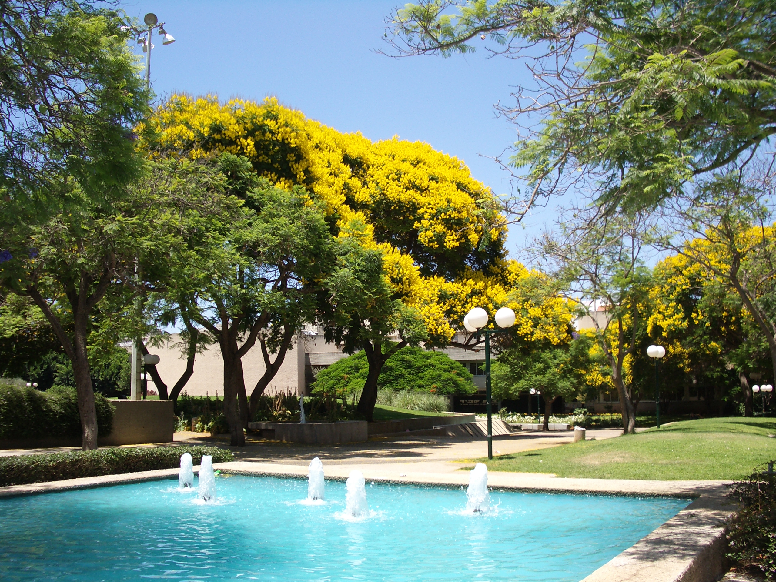 Kfar Saba, Israel, Summer